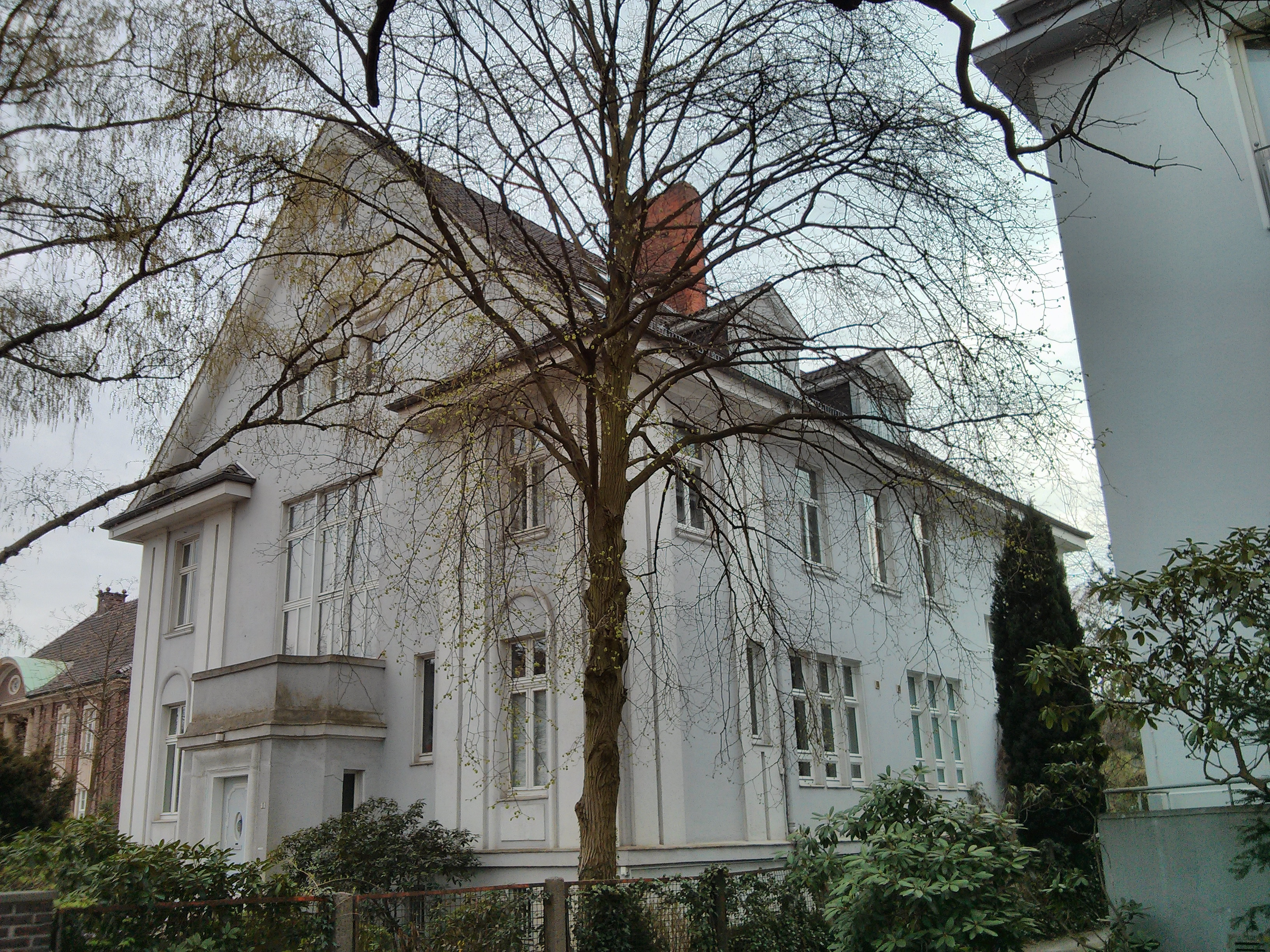 Villa Halle in Bremen, Kurfürstenallee 11 Das abgebildete Objekt ist ein geschütztes Kulturdenkmal in der Freien Hansestadt Bremen, mit der Nr. 0820 beim Landesamt für Denkmalpflege registriert.